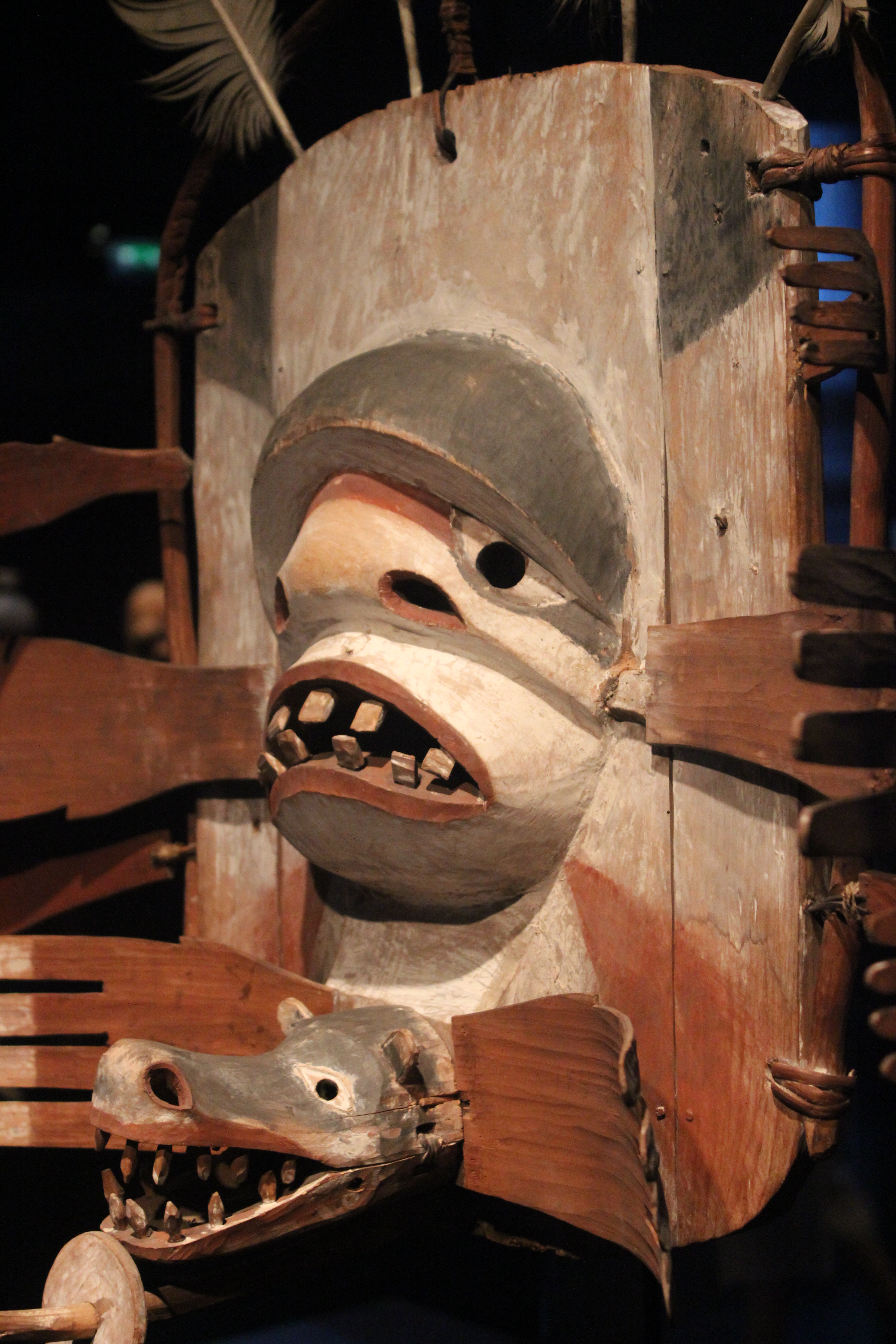 París, Musée du Quai Branly, Máscara Yup'ik.